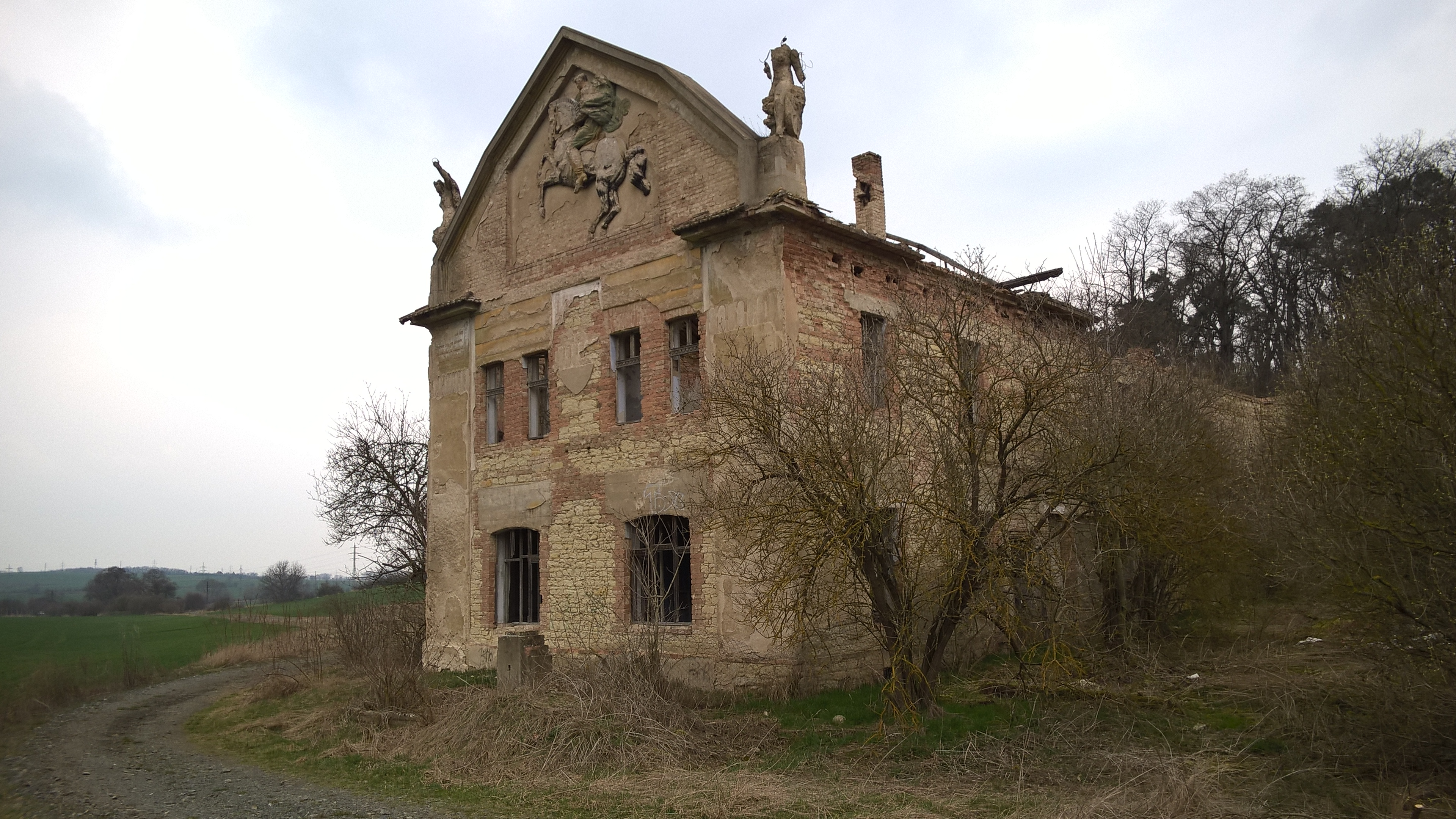 Usedlost Vladimírov, Rovné (Krabčice).